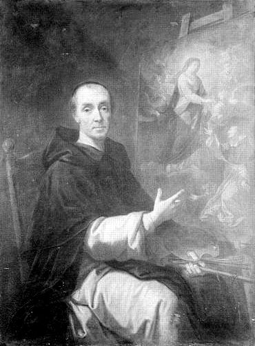 Self-portrait